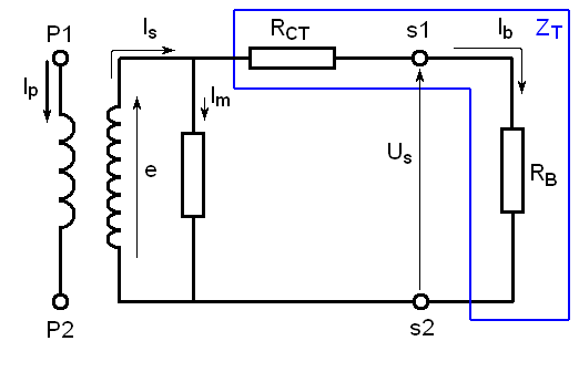 Equivalent schema van een stroomtransformator